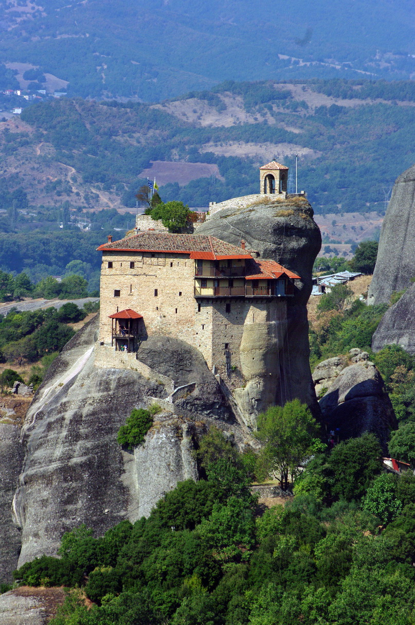 St. Nikolaos-Kloster, Meteora